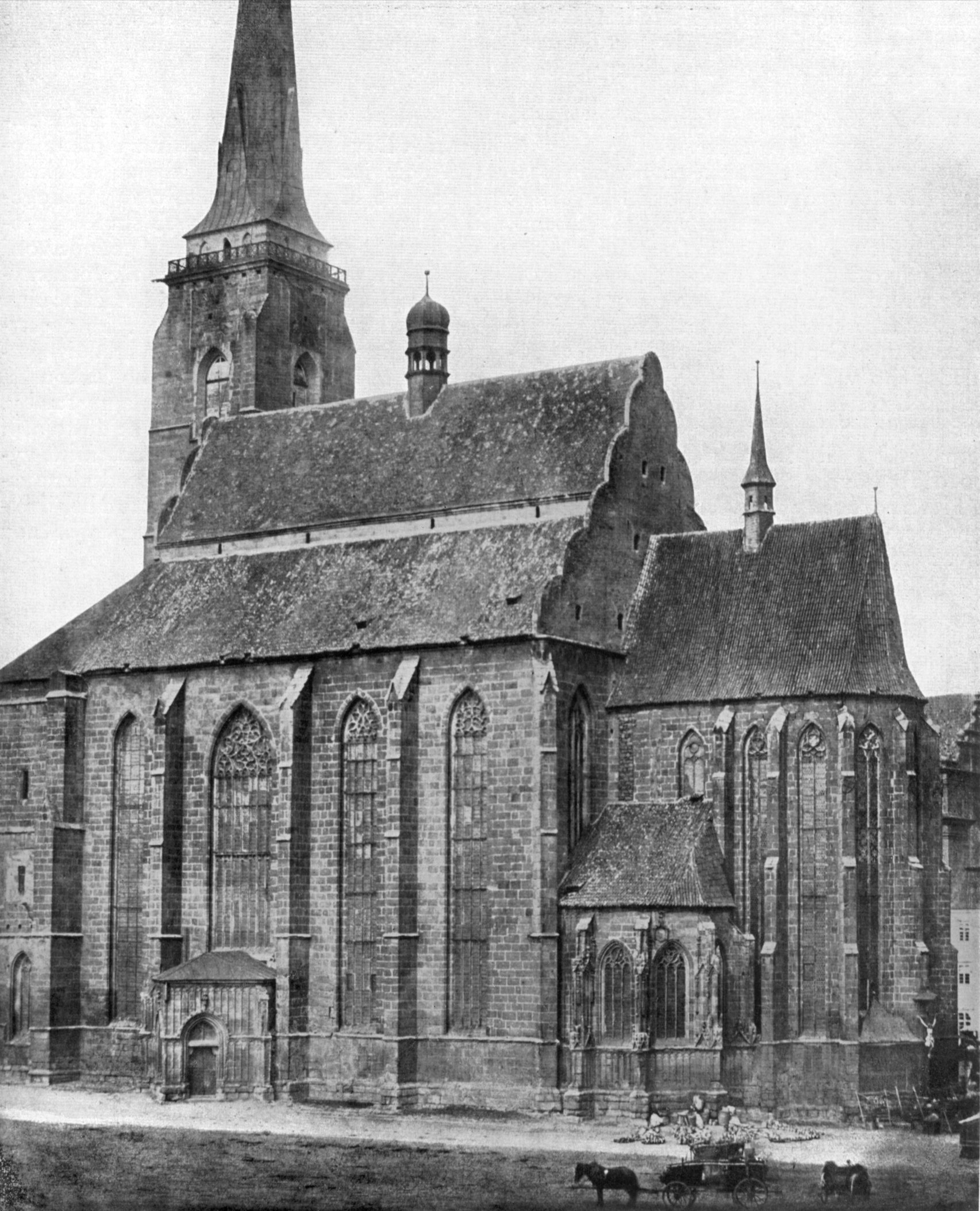 A. Groll - Arciděkanský kostel svatého Bartoloměje v Plzni, 1856